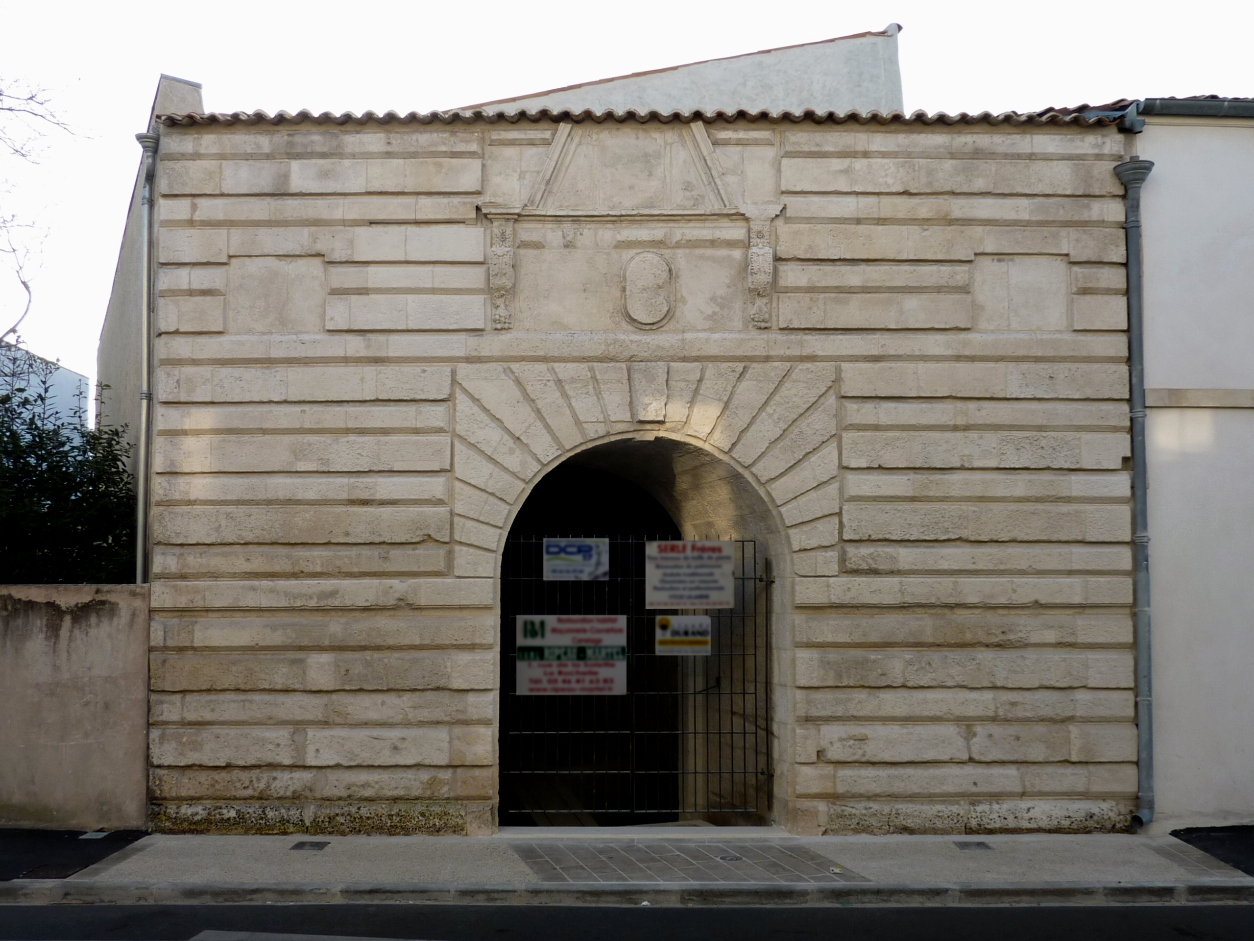 Porte Maubec rue Saint-Louis La Rochelle Charente Maritime France